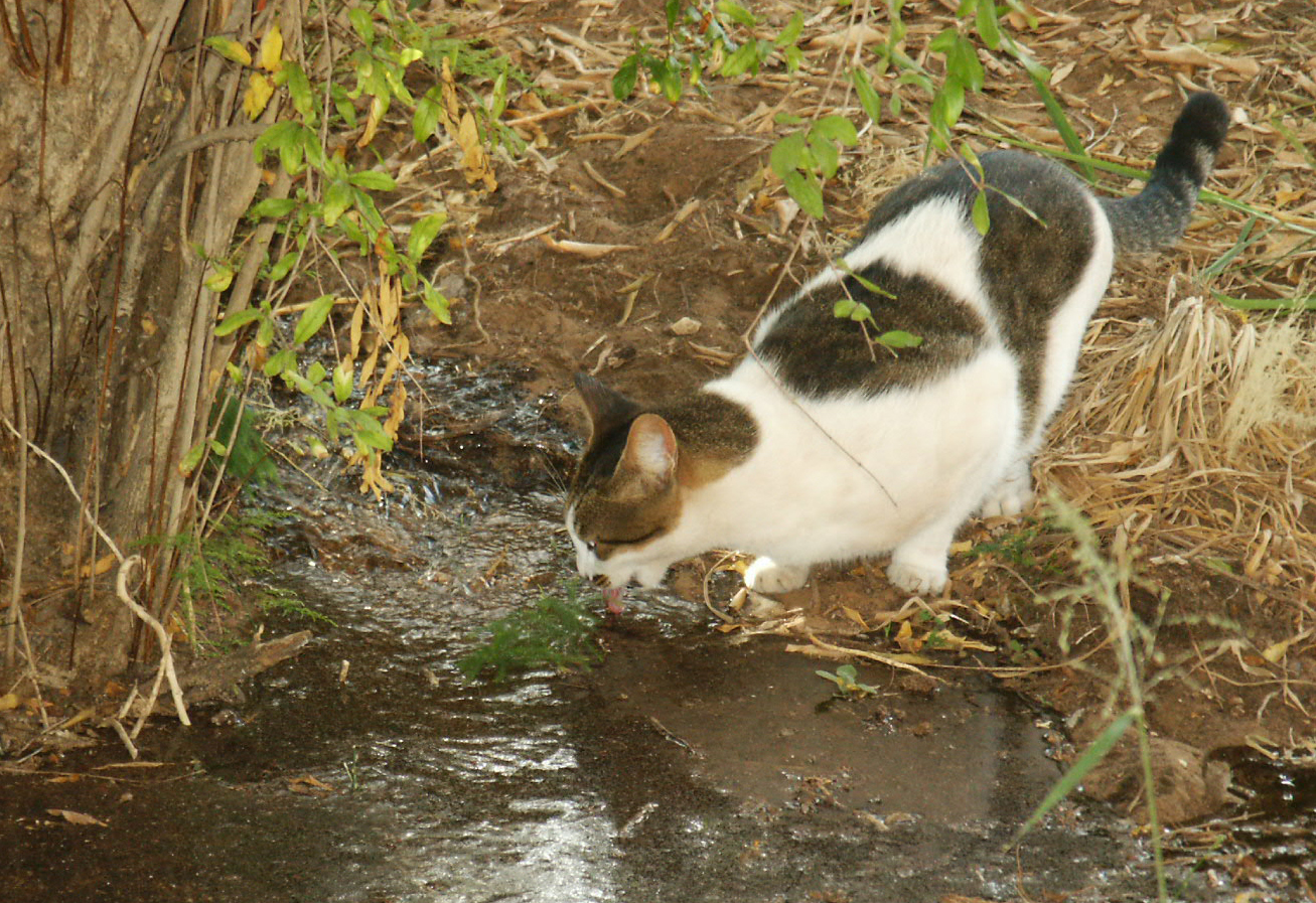 חתול רחוב שותה בגינה